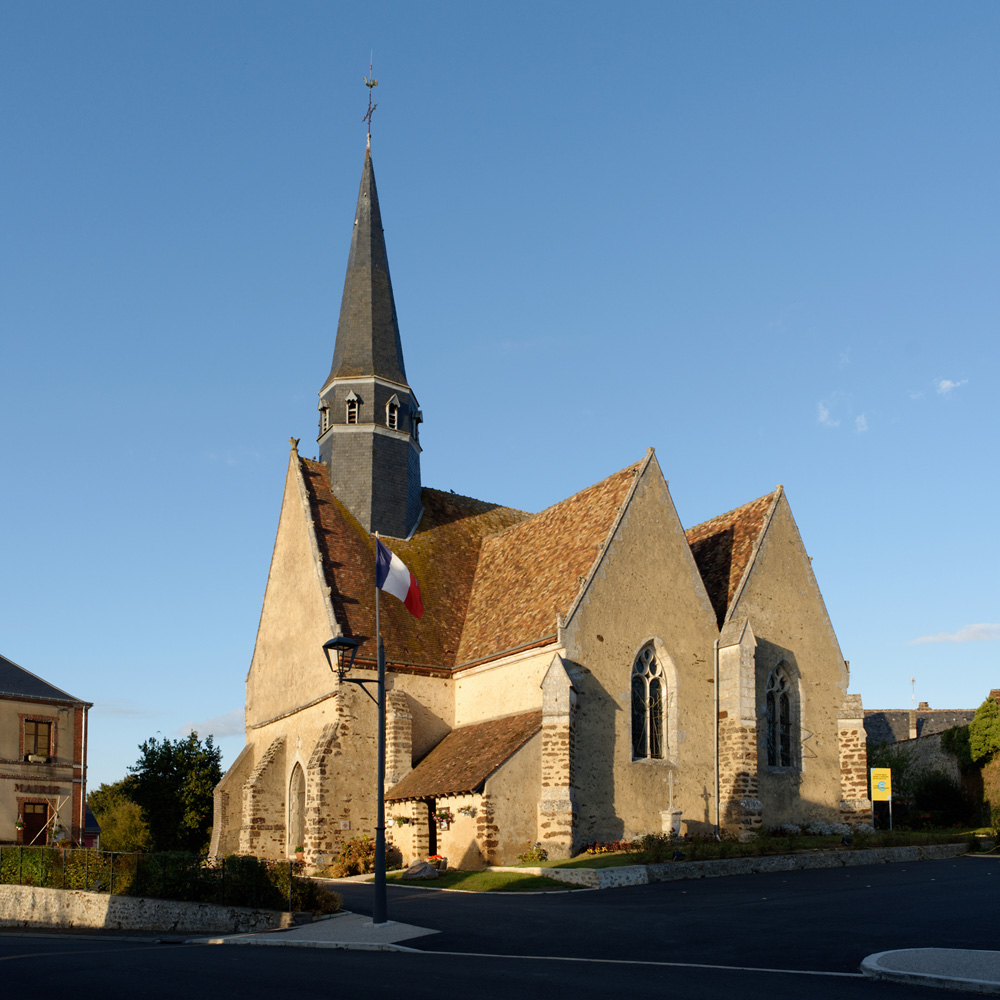 Église Saint-Pierre de Boursay, (InscritClassé, 19261958) .